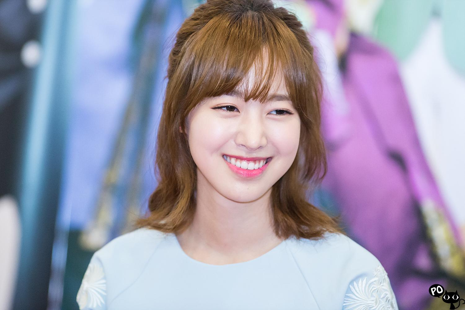 150502.롯데시네마.건대입구.위험한상견례2.진세연.팬싸인회